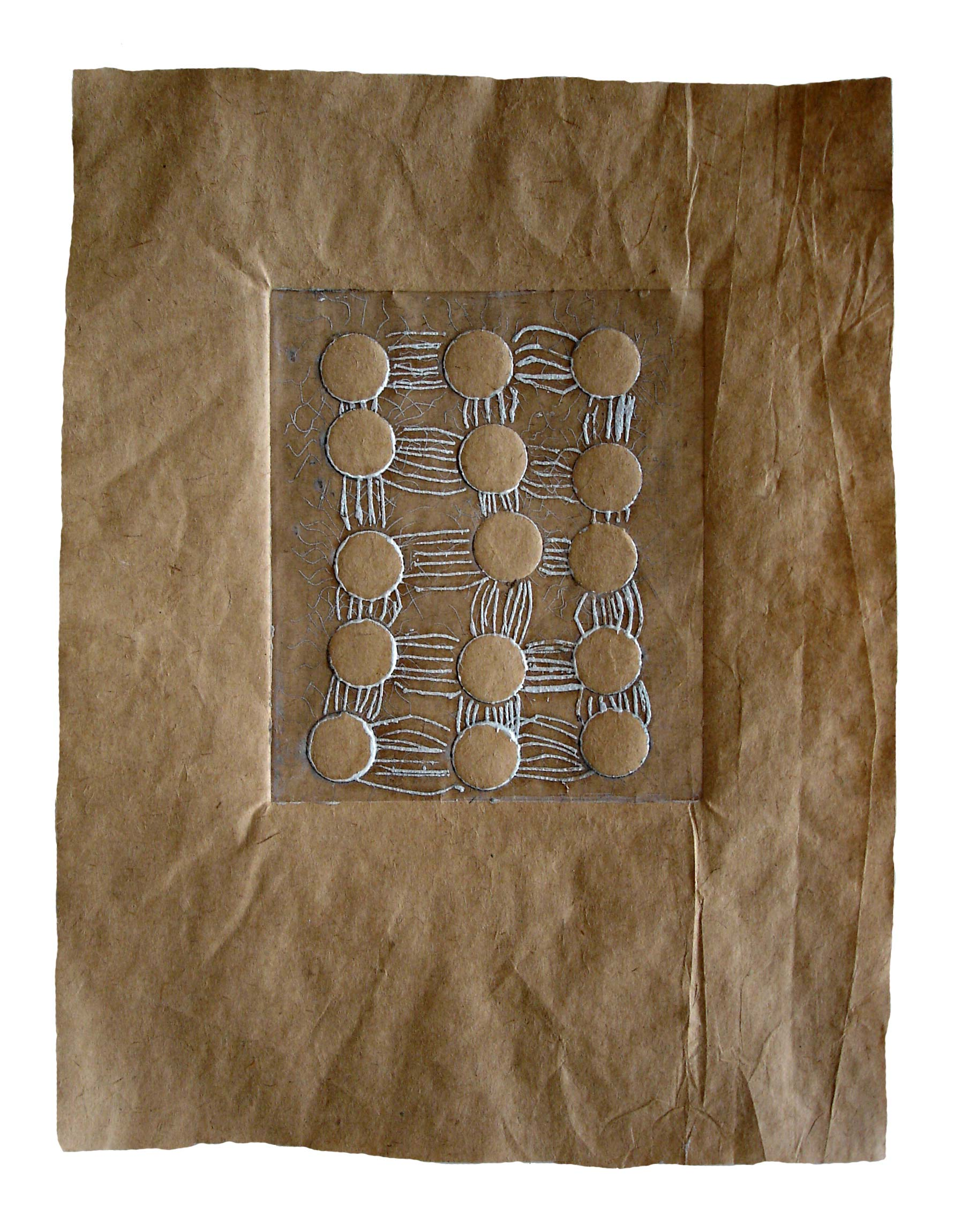 Edition 2 aus der Reihe organisch/anorganisch, 2006